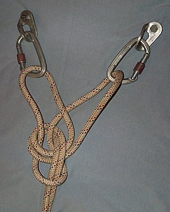 Réalisation du nœud de chaise à double sur son double